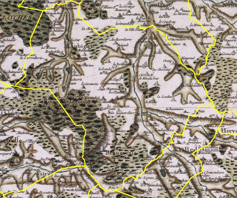 Loché-sur-Indrois sur la carte de Cassini. Les limites communales modernes figurant en jaune.